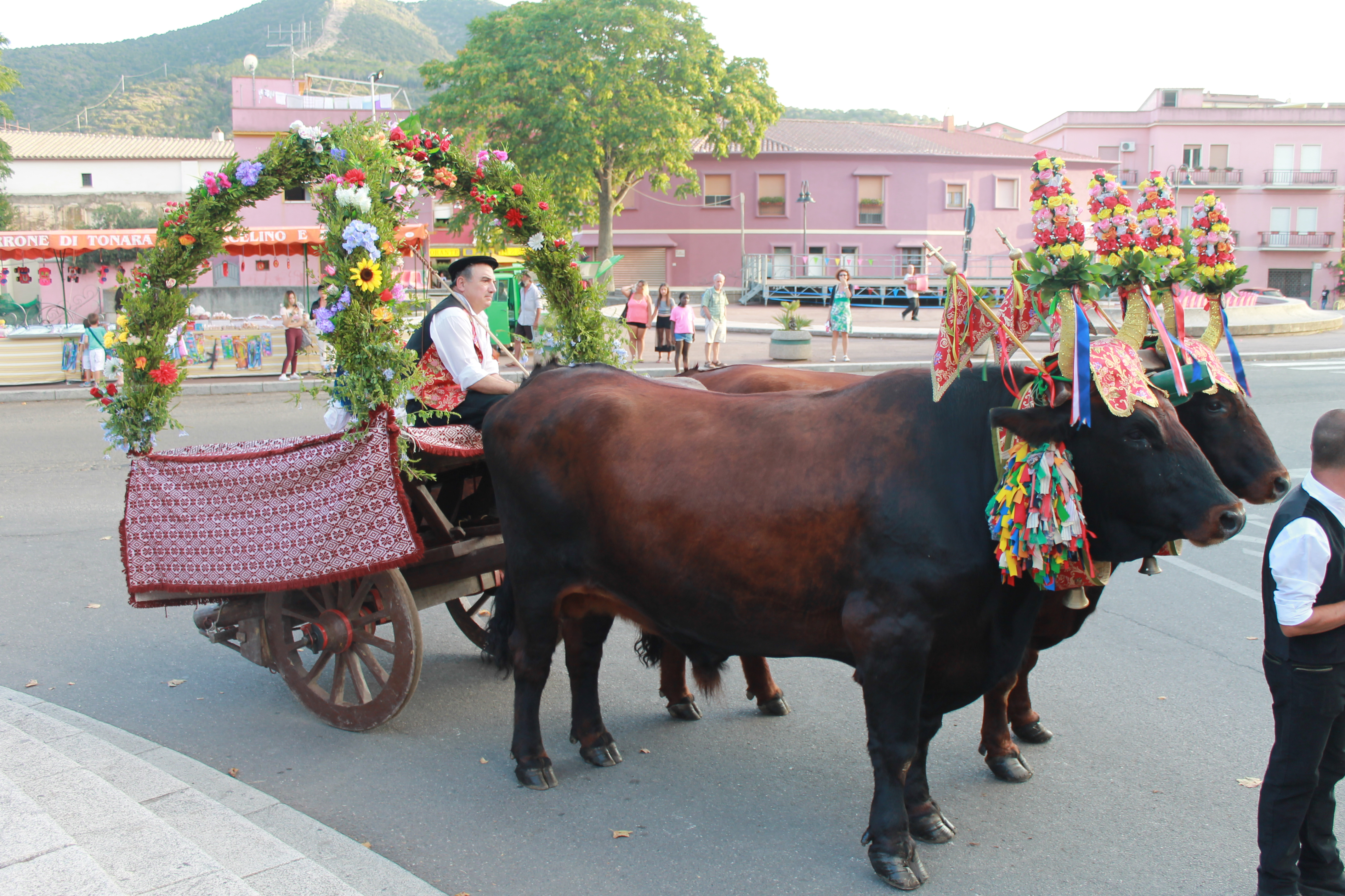 Sa tracca, tipico carro sardo adornato a festa, fotografata in occasione della festa patronale di Teulada.